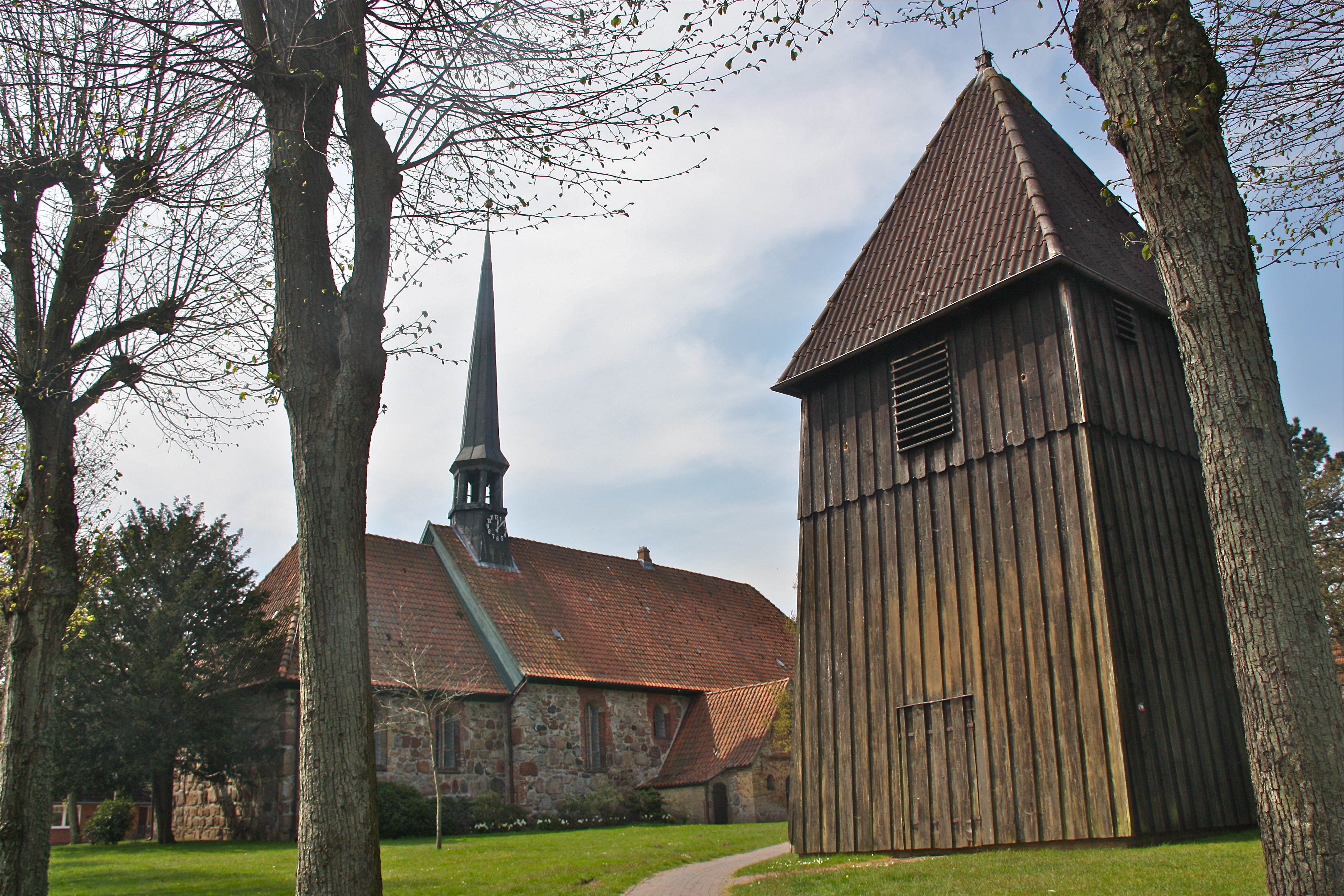 Dithmarschen, Tellingstedt, Kirche St. Martin, Kirchenschiff und Glockenturm